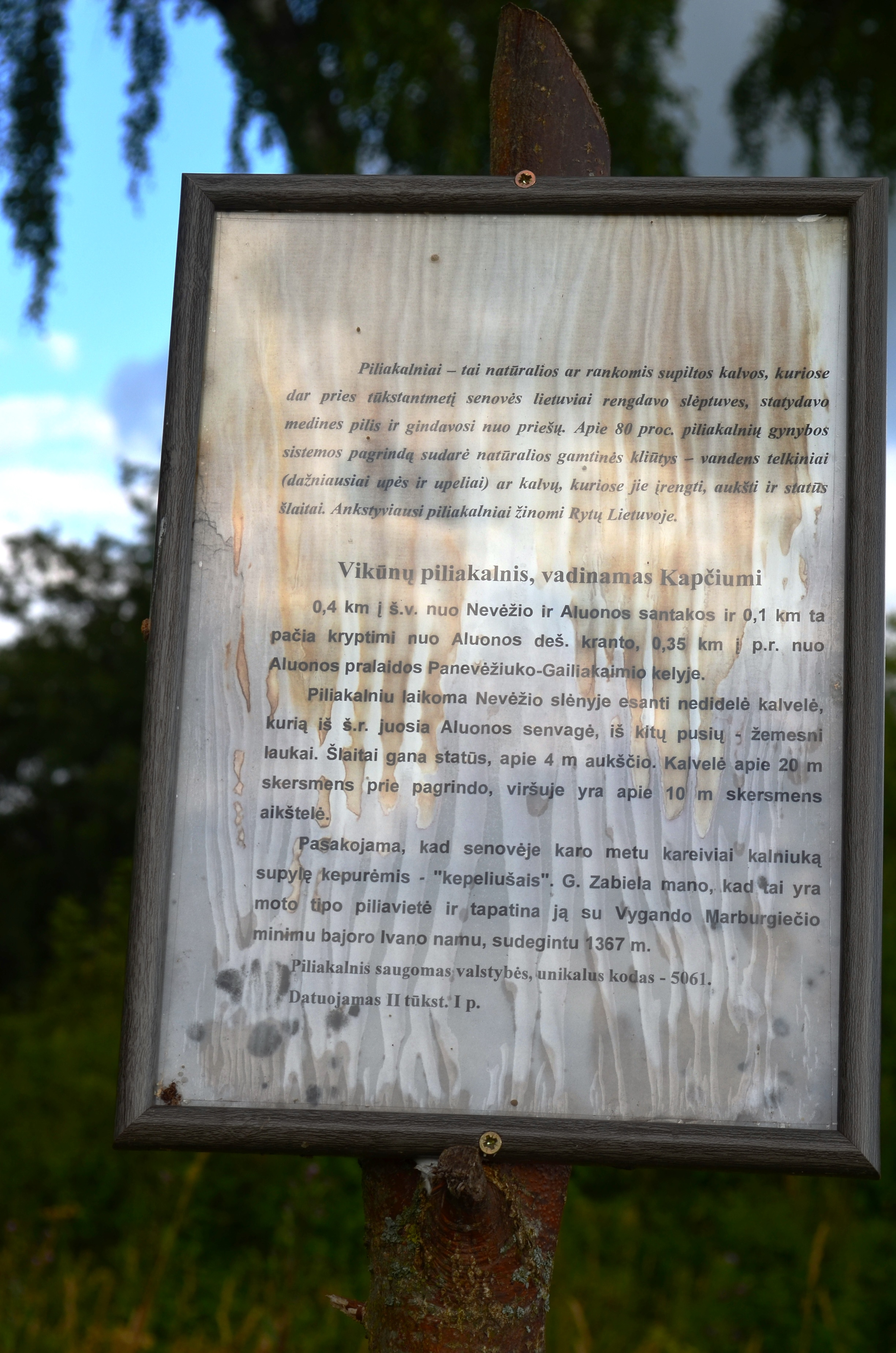 Informacinė lentelė, Vikūnų piliakalnis, Kauno raj.